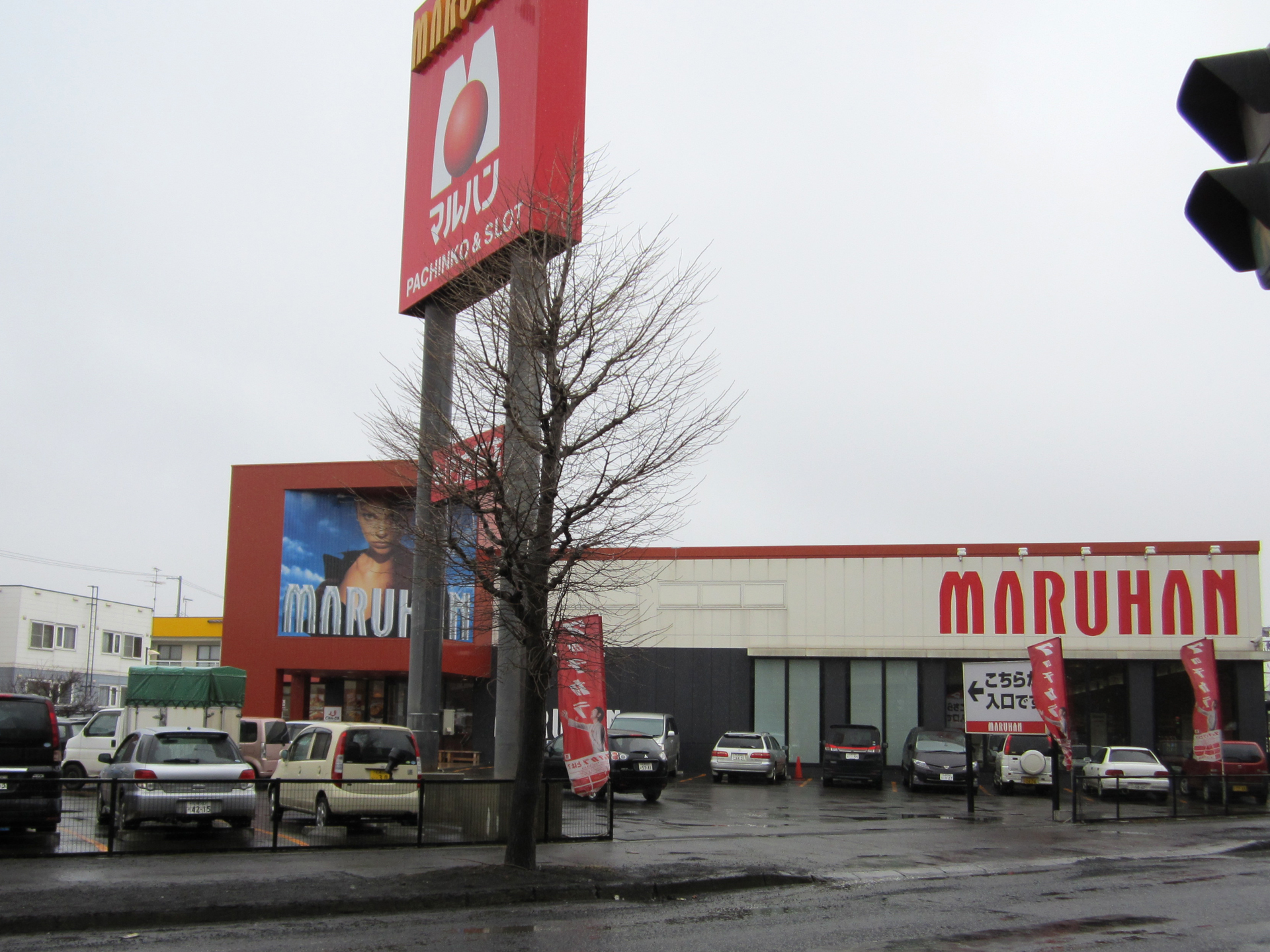 マルハン白石店（北海道札幌市）